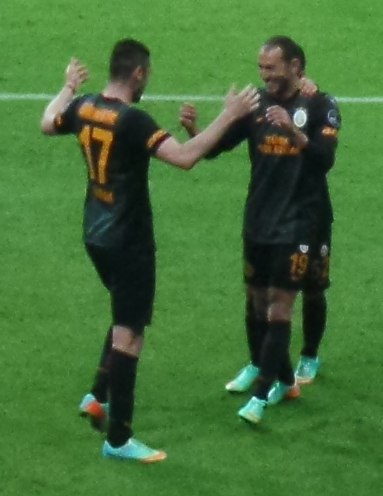 Umut Bulut ve Burak Umut'un tam 372 gün sonra attığı Süper Lig golünü kutlarlarken